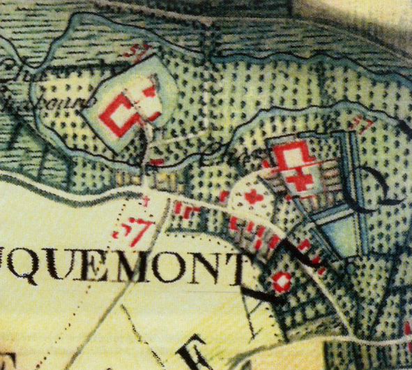 Die Schlösser Schaloen und Genhoes in Alt-Valkenburg auf der Ferraris-Karte